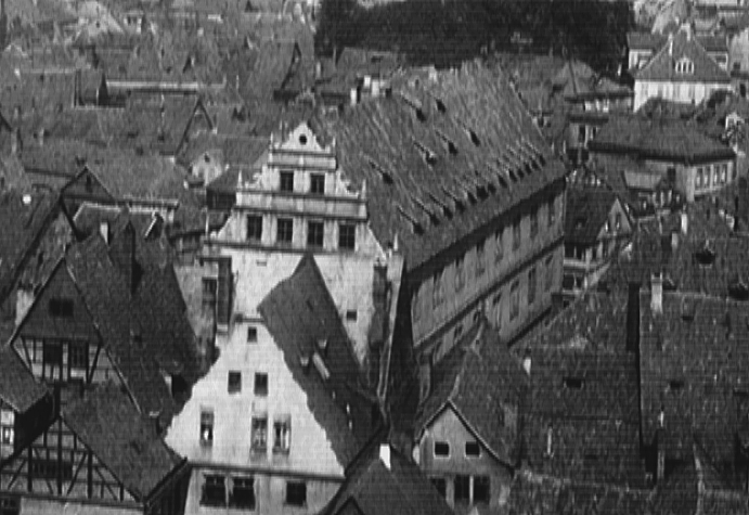 Ehemaliges Zeughaus, heute Staatsarchiv Coburg - Coburg, Bayern